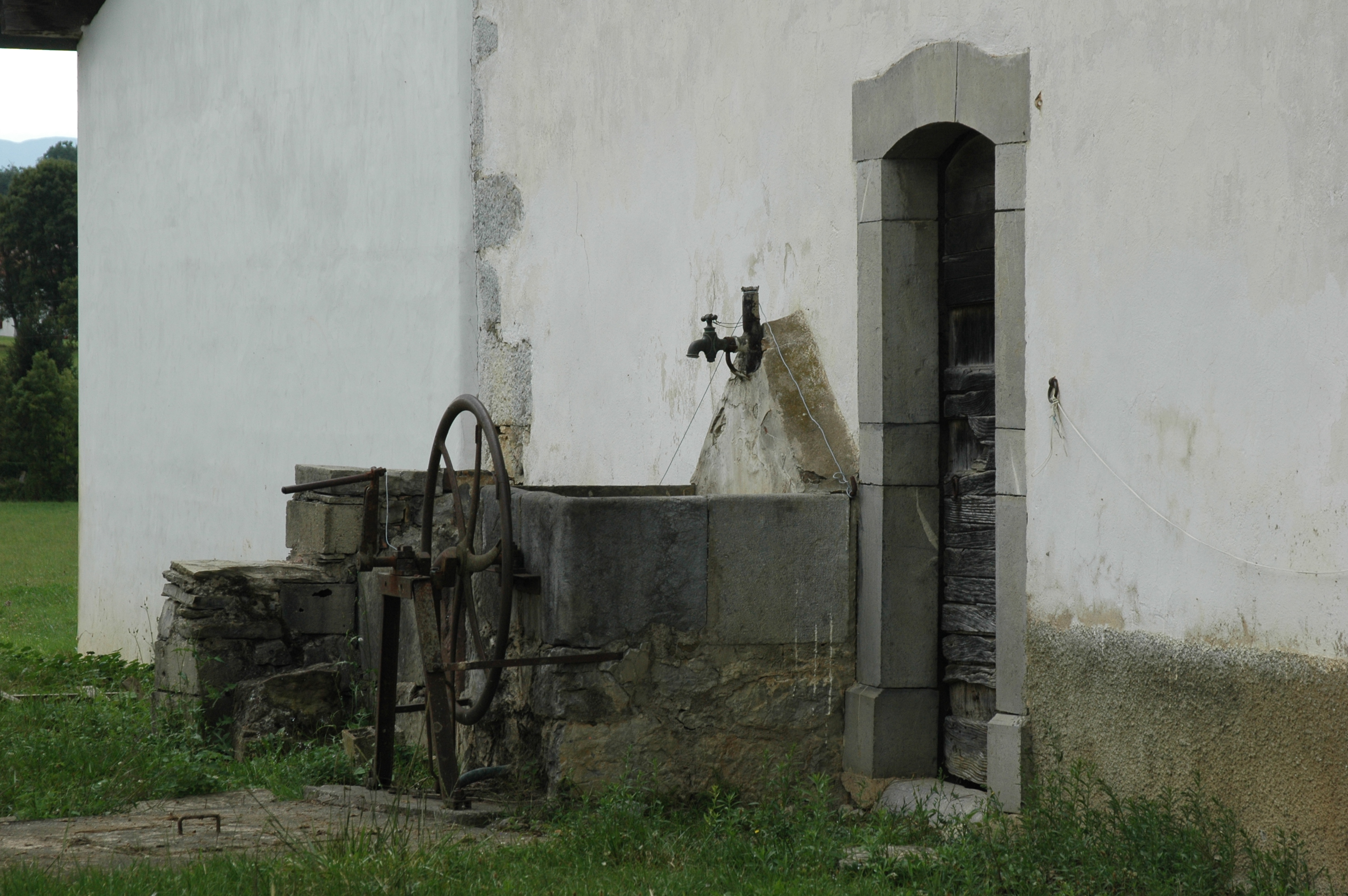 Petit lavoir à Ainhice-Mongelos